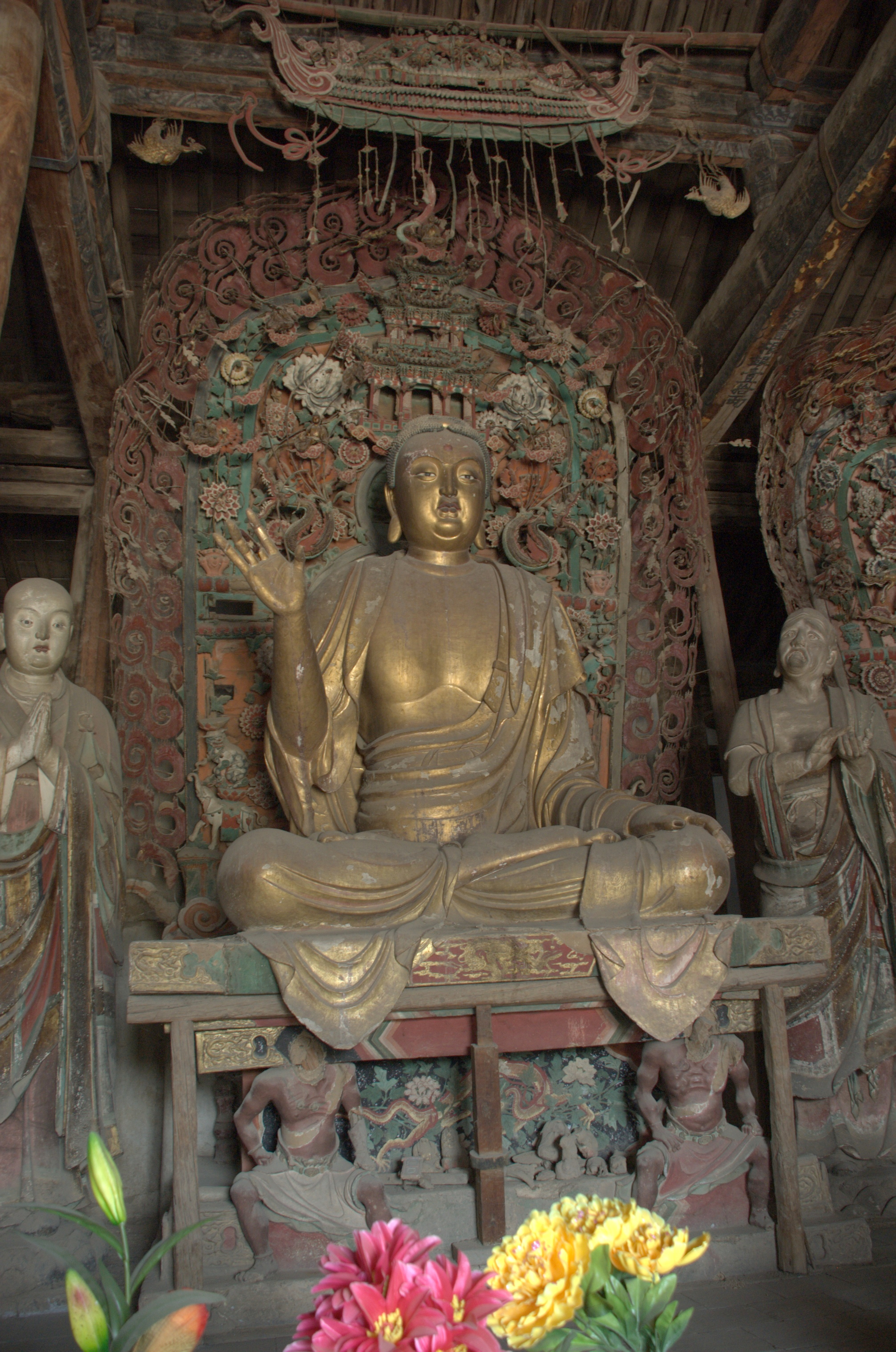 山西定襄洪福寺大殿彩塑